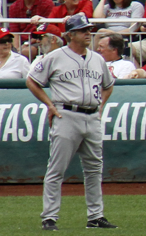 Rene Lachemann